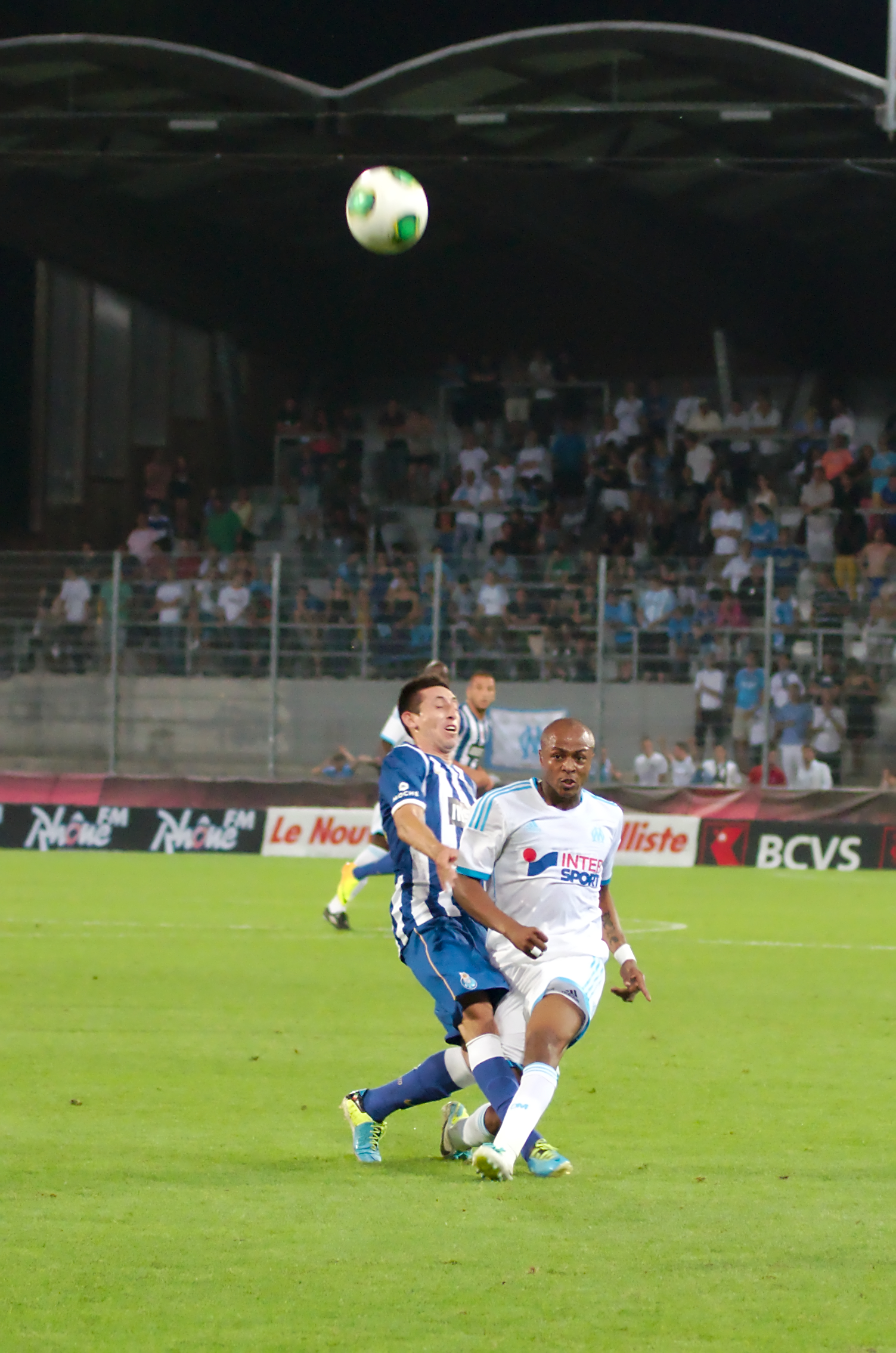 Valais Cup 2013 - OM-FC Porto - 20130713 - Herrera et André Ayew